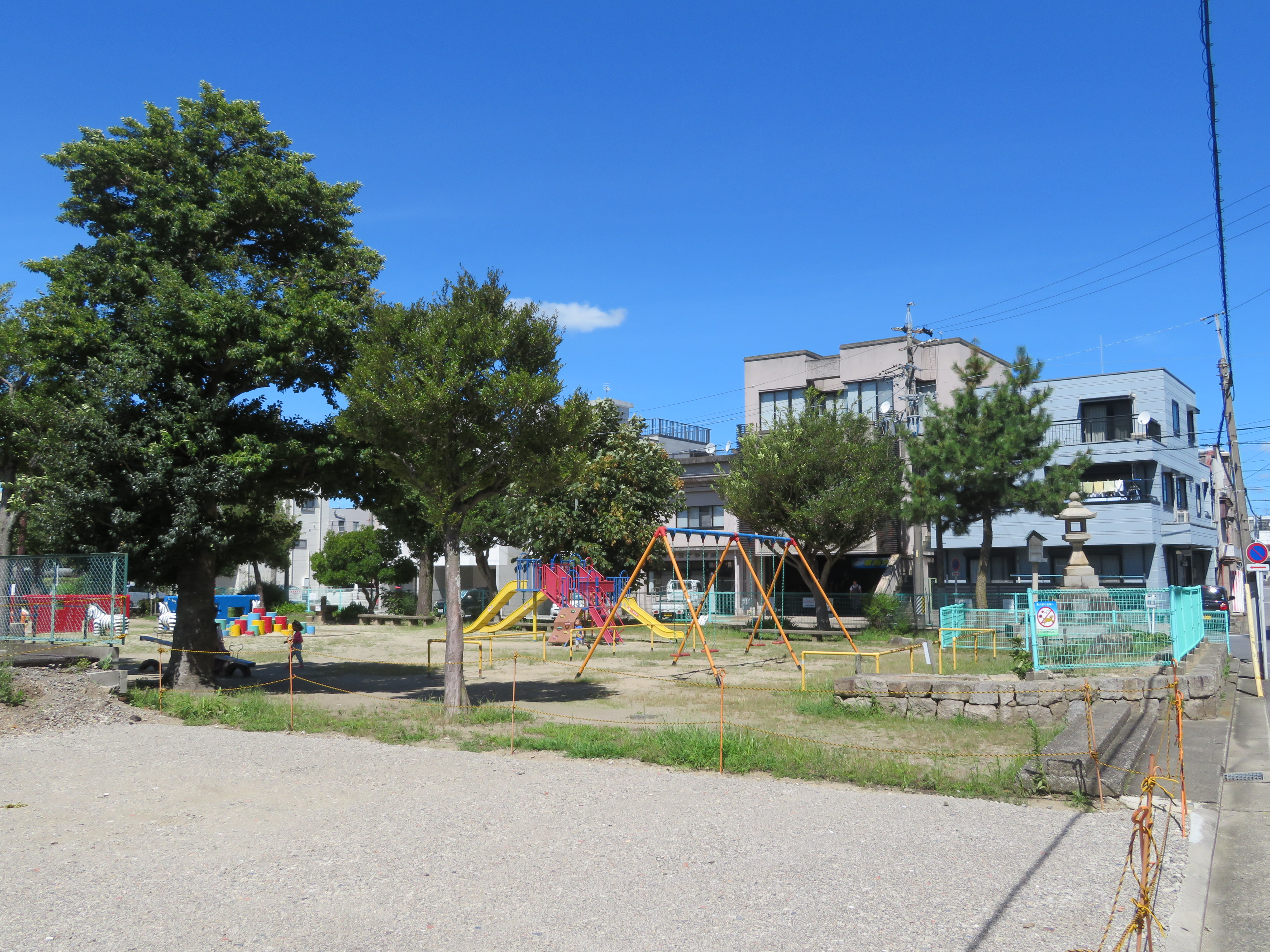 御旗公園（岡崎市材木町）